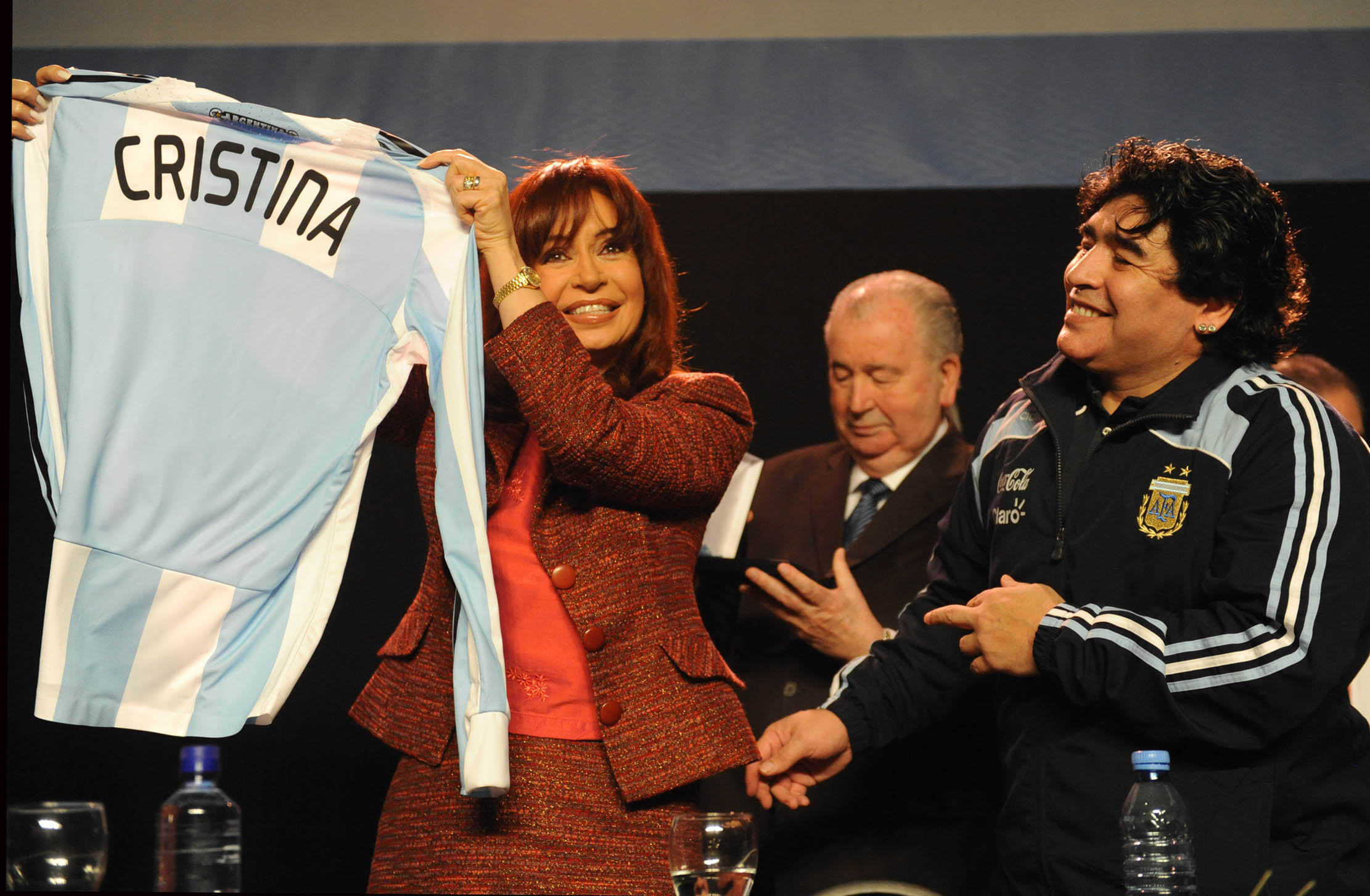 La presidenta argentina Cristina Fernández de Kirchner junto a Diego Maradona